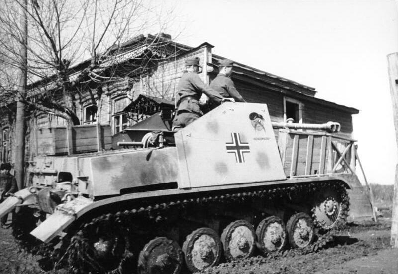 7,5 cm Panzerjäger "Marder II" auf Pz.II [Name "Kohlenklau"]